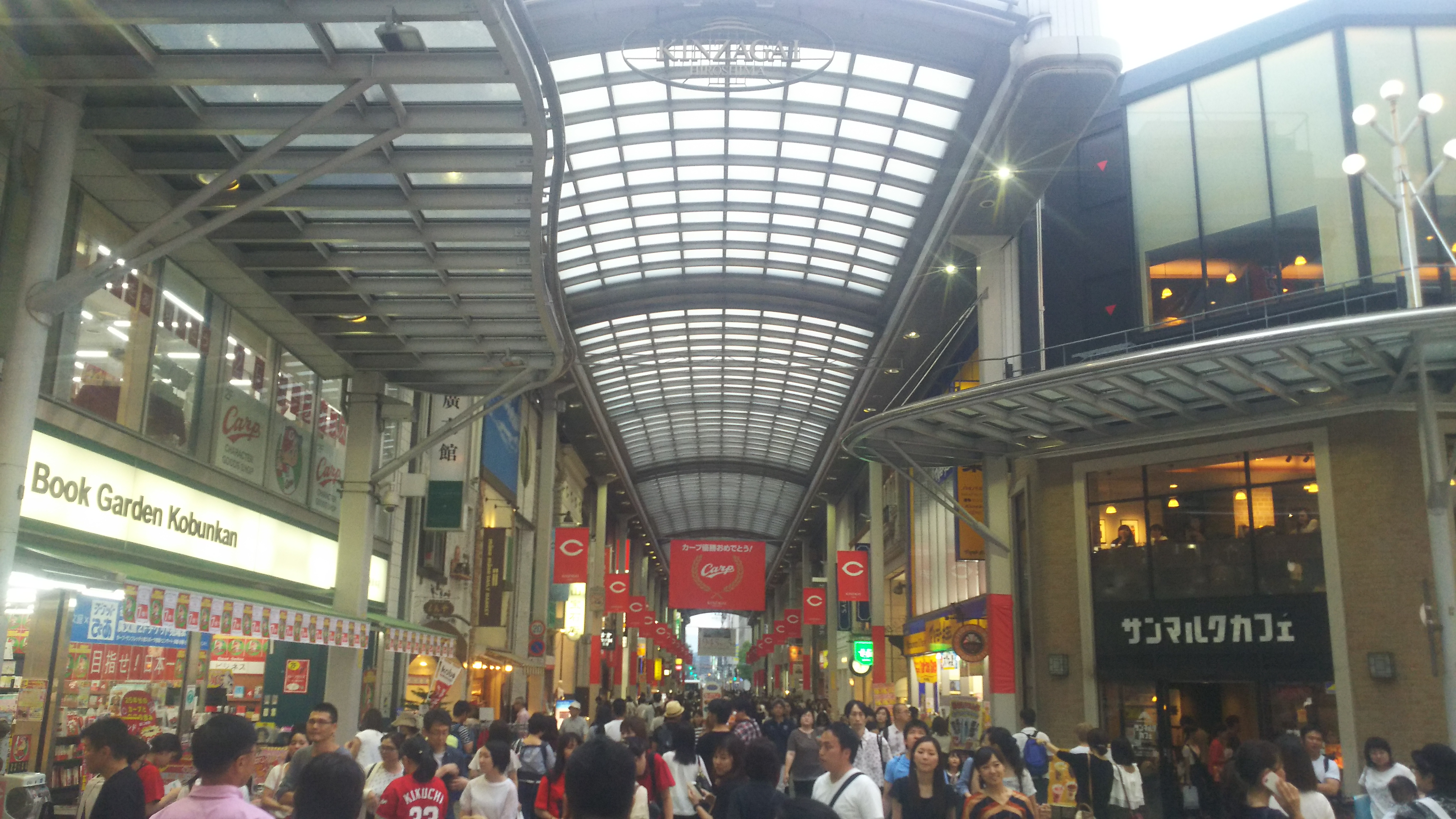 広島市中区本通、金座街商店街